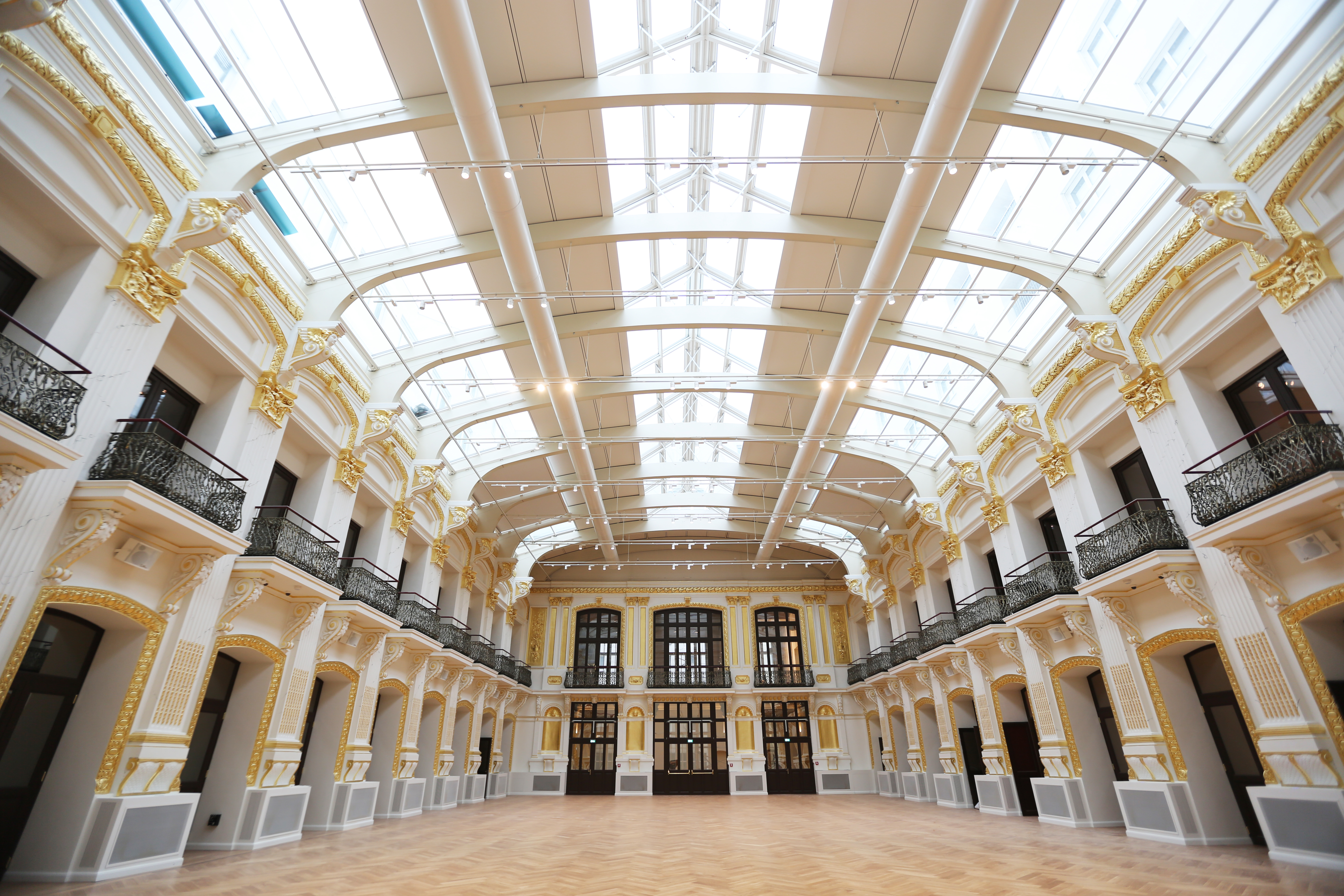 Sophiensäle, ehem. Sophienbad